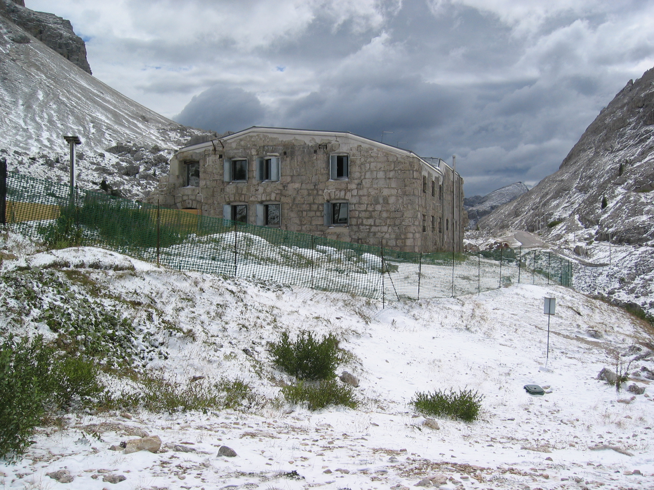 Werk Tre Sassi am Valparolapass